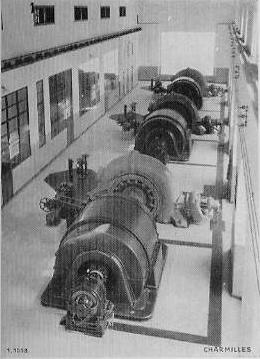 Maschinensaal des Mitteldruck-Laufwasserkraftwerks Martigny-Bourg